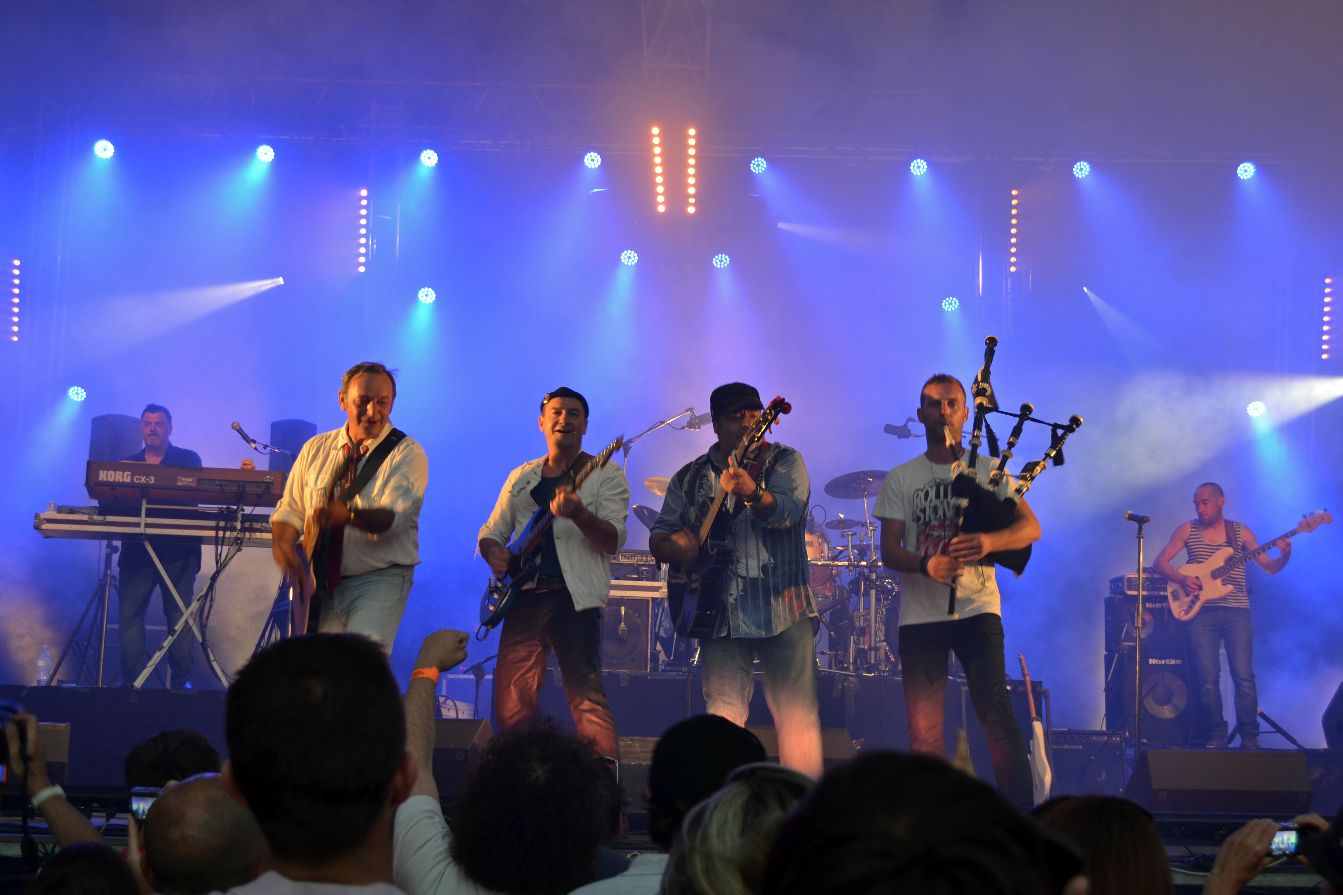 Soldat Louis au festival Kastell Paol à Saint-Pol-de-Léon (Nord Finistère, Bretagne) le 14 juillet 2013.